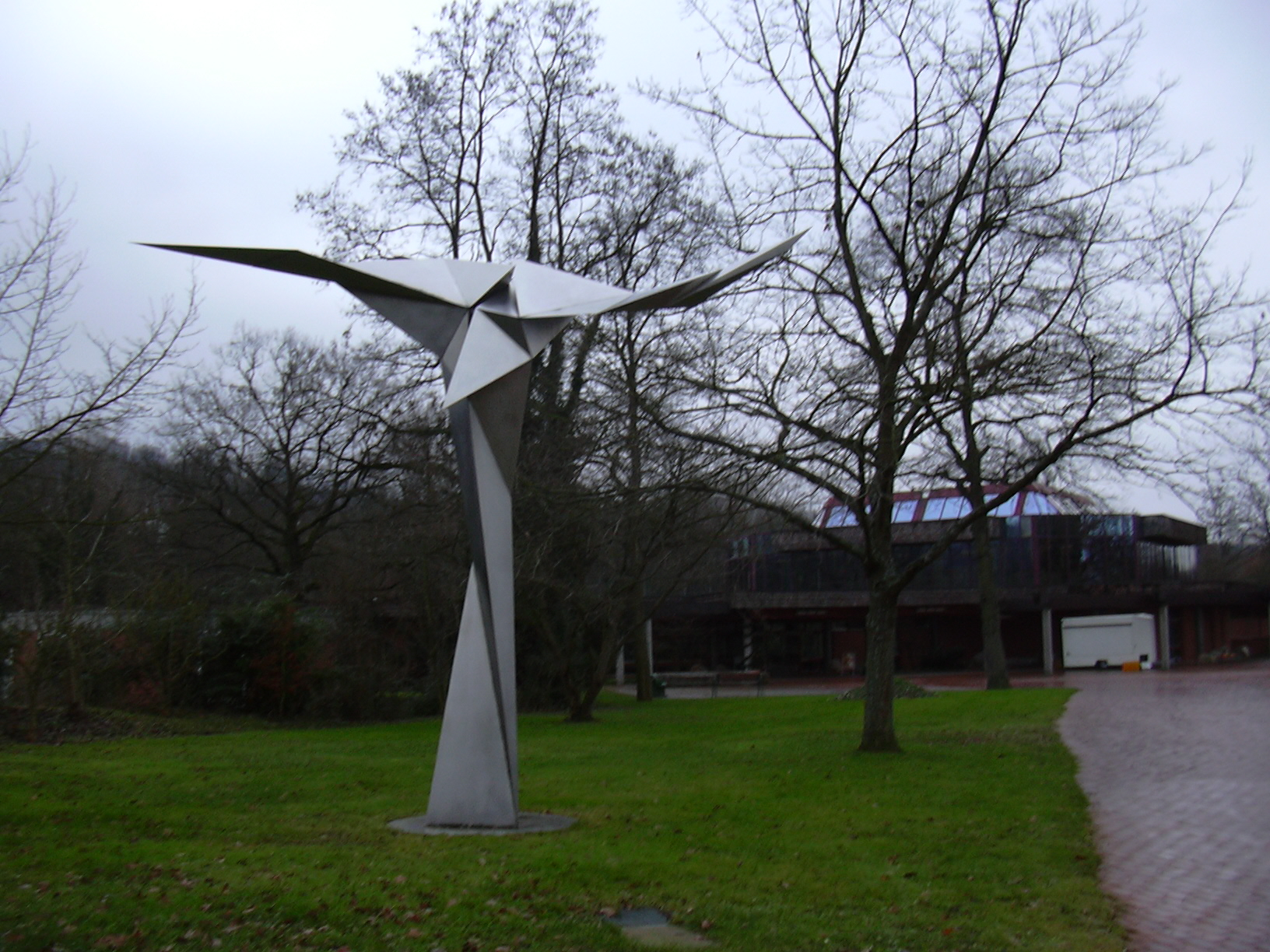 Bad Bellingen, sculpture by Erich Hauser, Germany